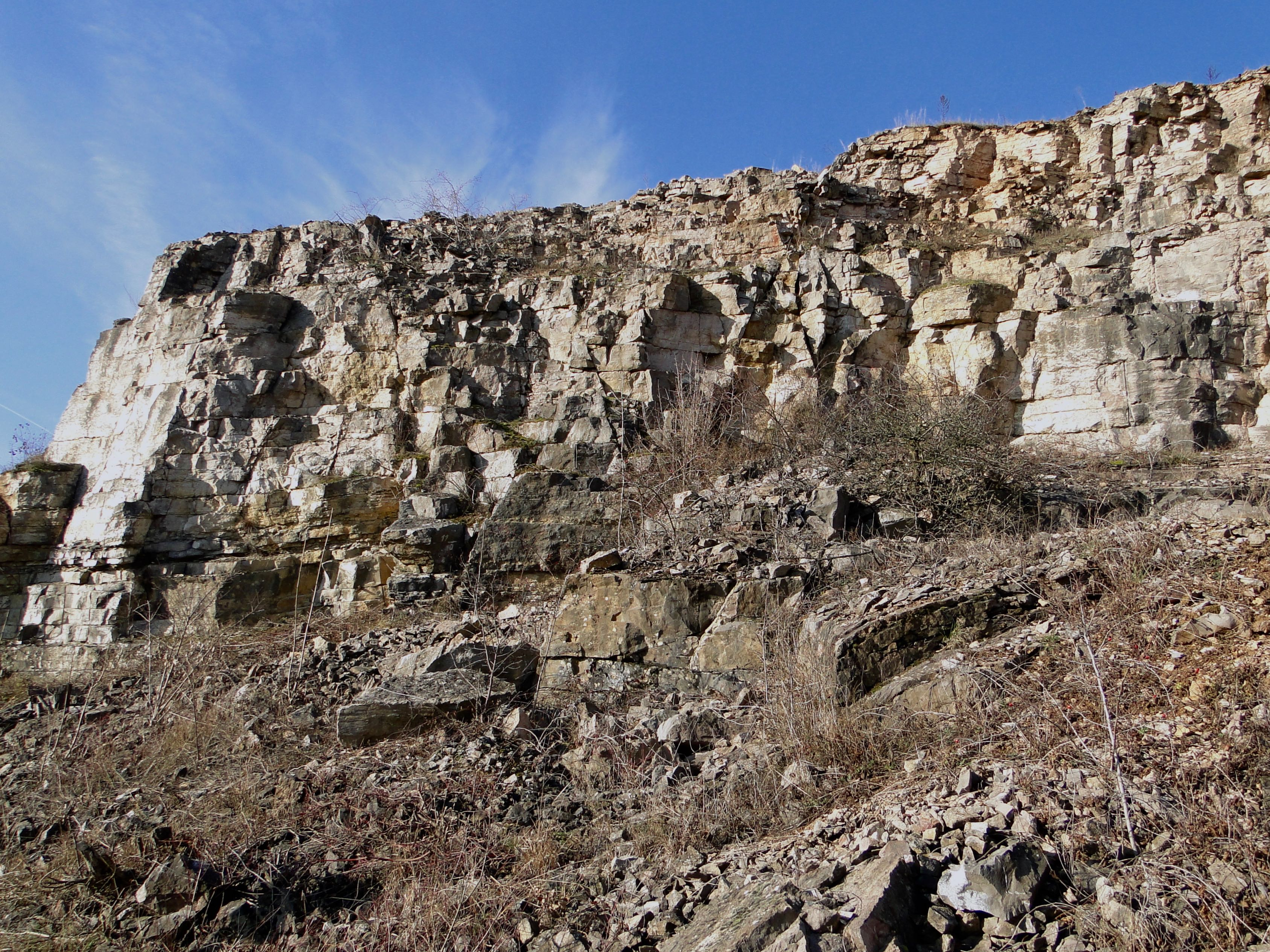 PP Cikánka II